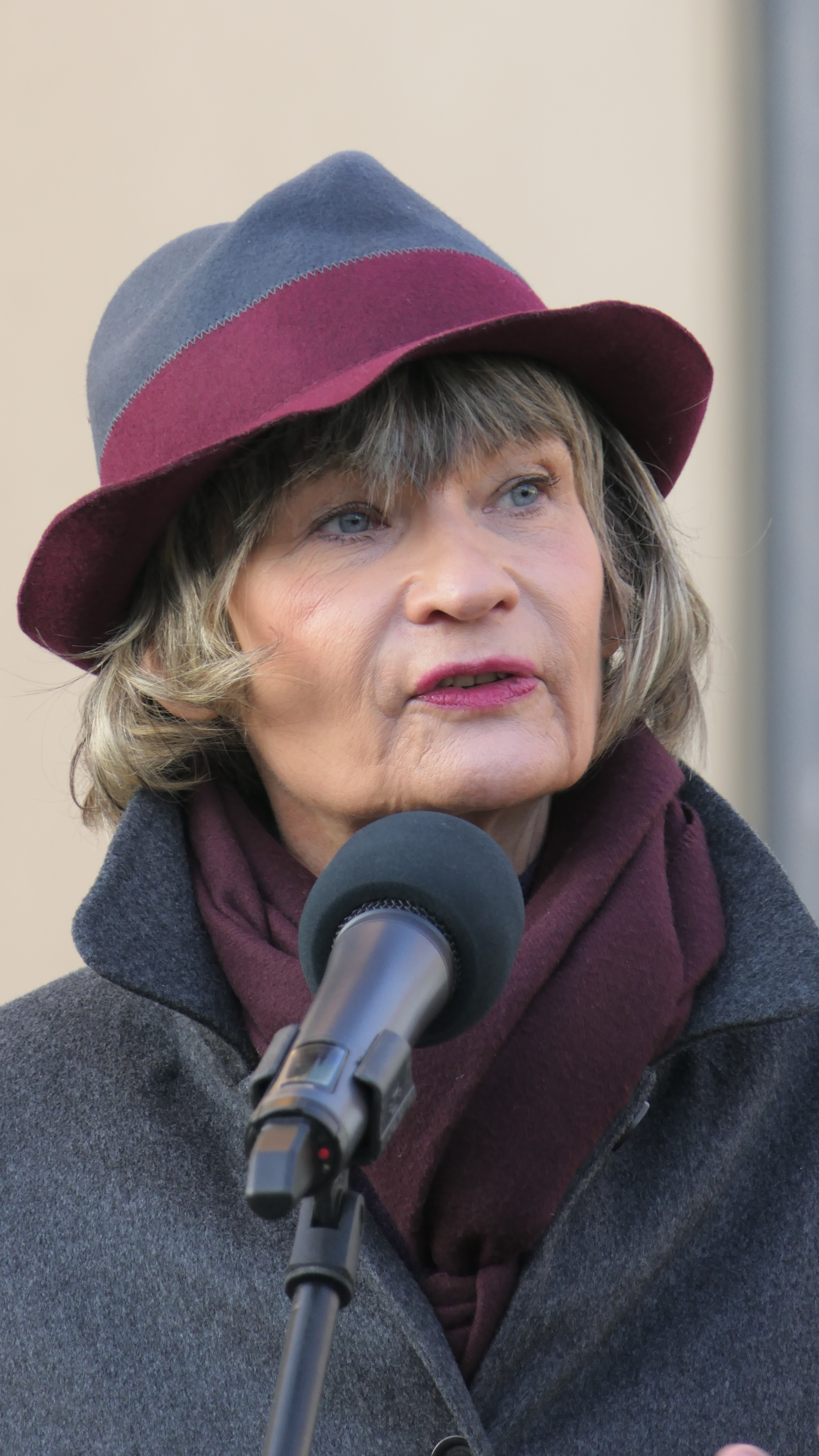 Oberbürgermeisterin Barbara Ludwig, anlässlich der Verlegung von Stolpersteinen in Chemnitz sm 5. Dezember 2019